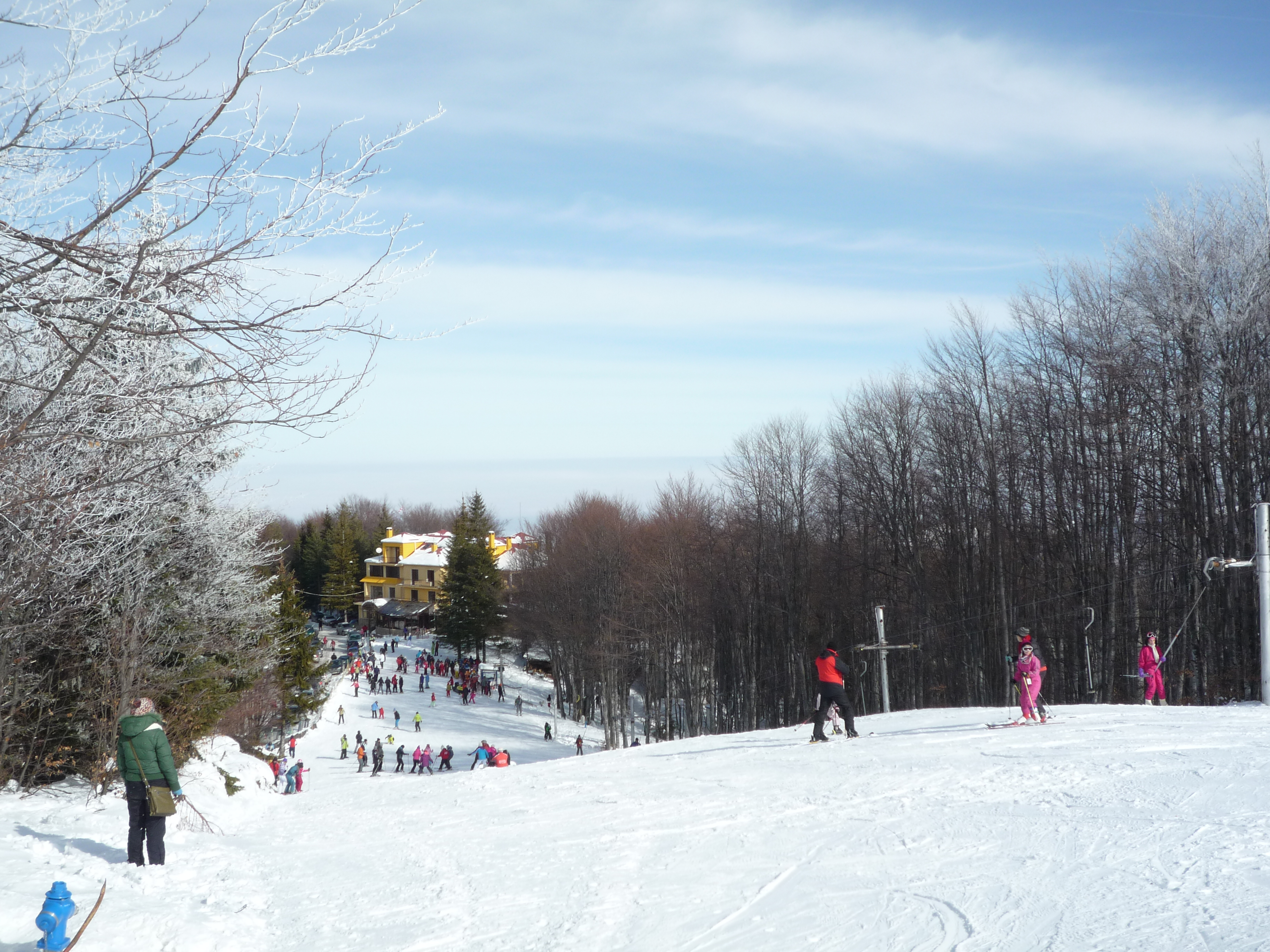 Troyan, Beklemeto